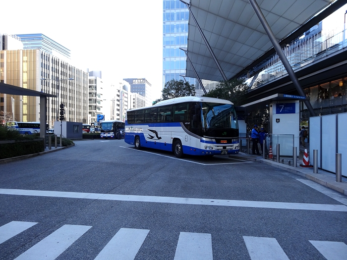 東京駅高速バスターミナル